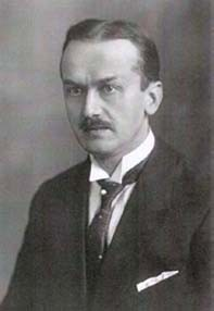 Johannes Käis